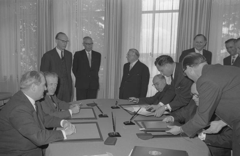 Unterzeichnung eines deutsch-luxemburgischen Sozialabkommens im Auswärtigen Amt, Bonn. Auf beiden Seiten waren die zuständigen Minister - die Herren Blank bzw. Dr. Colling - an der Unterzeichnung beteiligt.